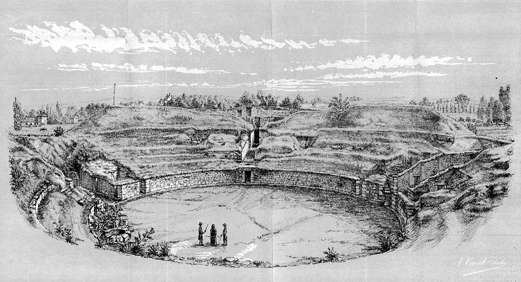 Les arènes de Senlis en 1878, treize ans après leur découverte et le début du déblaiement, qui n'était terminé qu'en 1889.